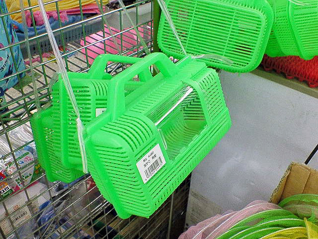 昆虫用の虫篭。